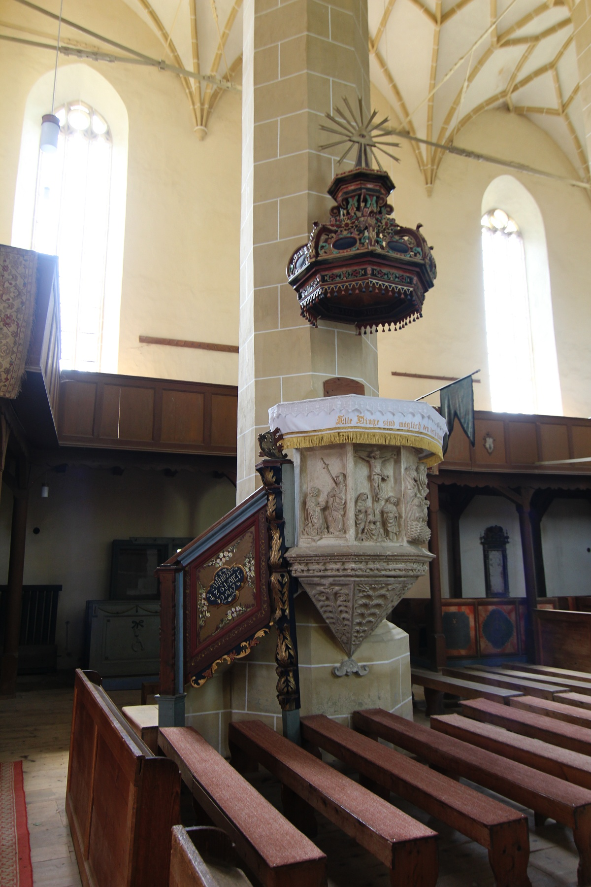 Biertan: Biserica evanghelică 01